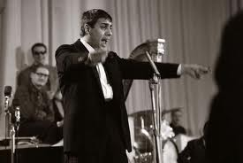 Adriano Celentano interprete la célèbre chanson Azzurro dans les années 1960